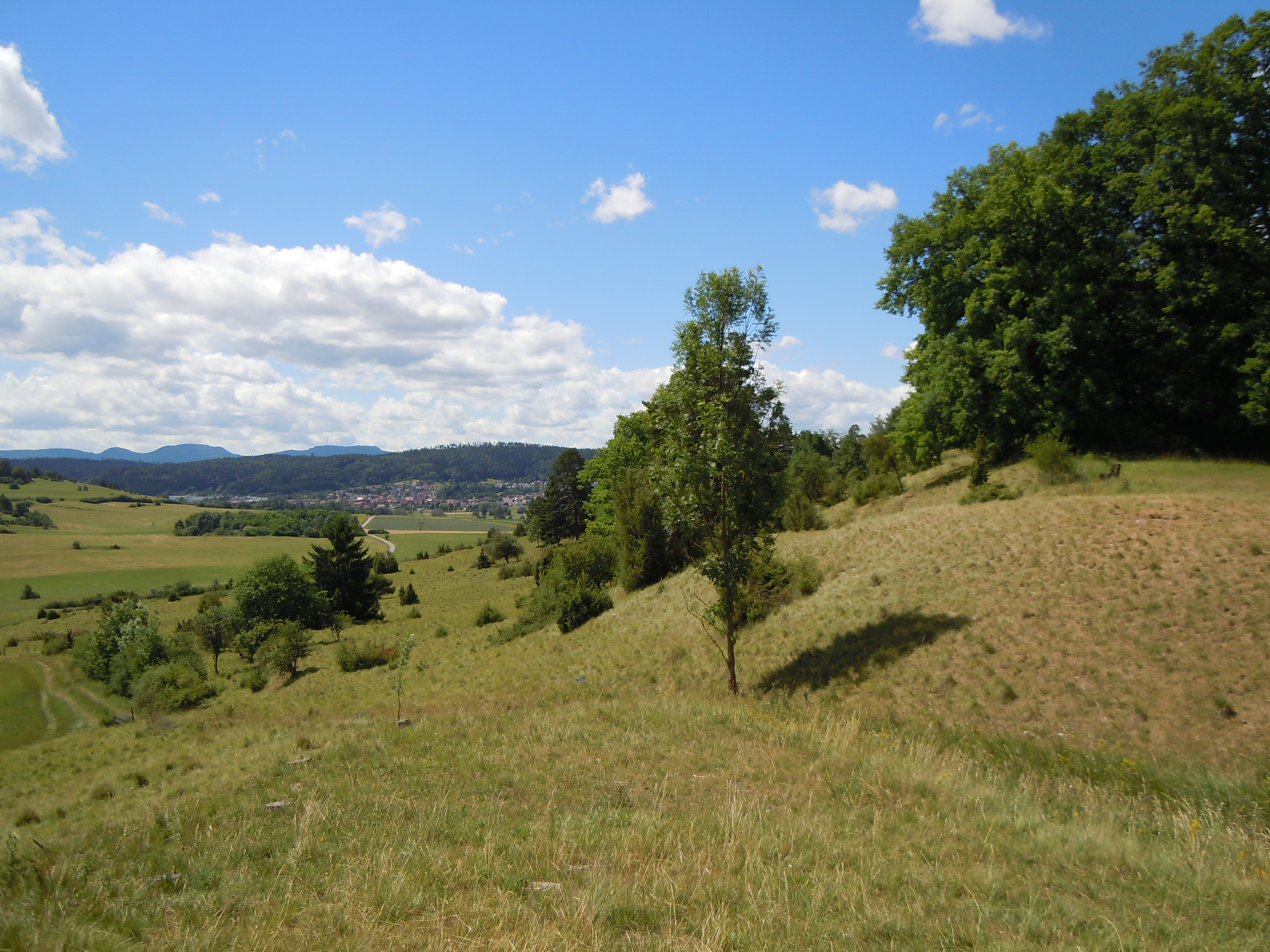 Naturschutzgebiet Stettener Weinberg: Der Osten des Gebiets, Blickrichtung Süd, hangabwärts. Im Hintergrund der Haigerlocher Stadtteil Owingen, ganz hinten der Albtrauf